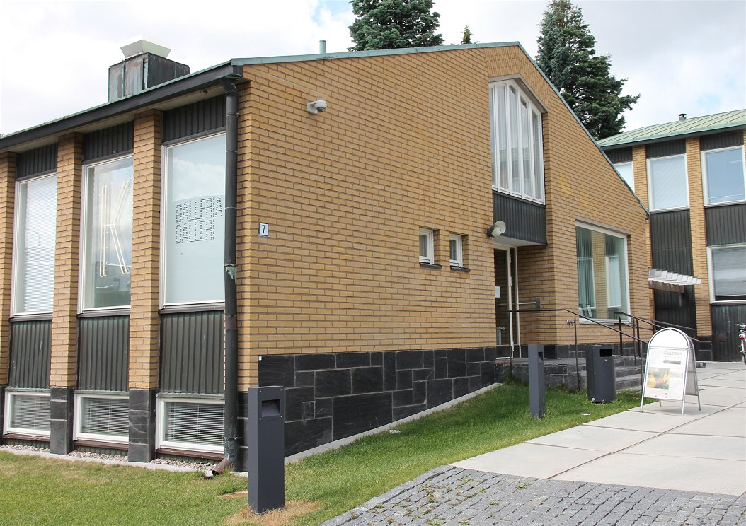 Galleria K, joka on saanut nimensä Mestari K:n (taidegraafikko Pentti Kaskipuro) mukaan, on Vantaan taidemuseon ja Vantaan taiteilijaseuran ylläpitämä taidegalleria Vantaan Tikkurilan kaupunginosassa. Galleria K toimii Vantaan kaupungintalon sivurakennuksessa.